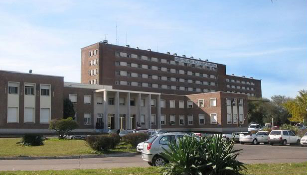 Fachada del Hospital Alejandro Posadas.